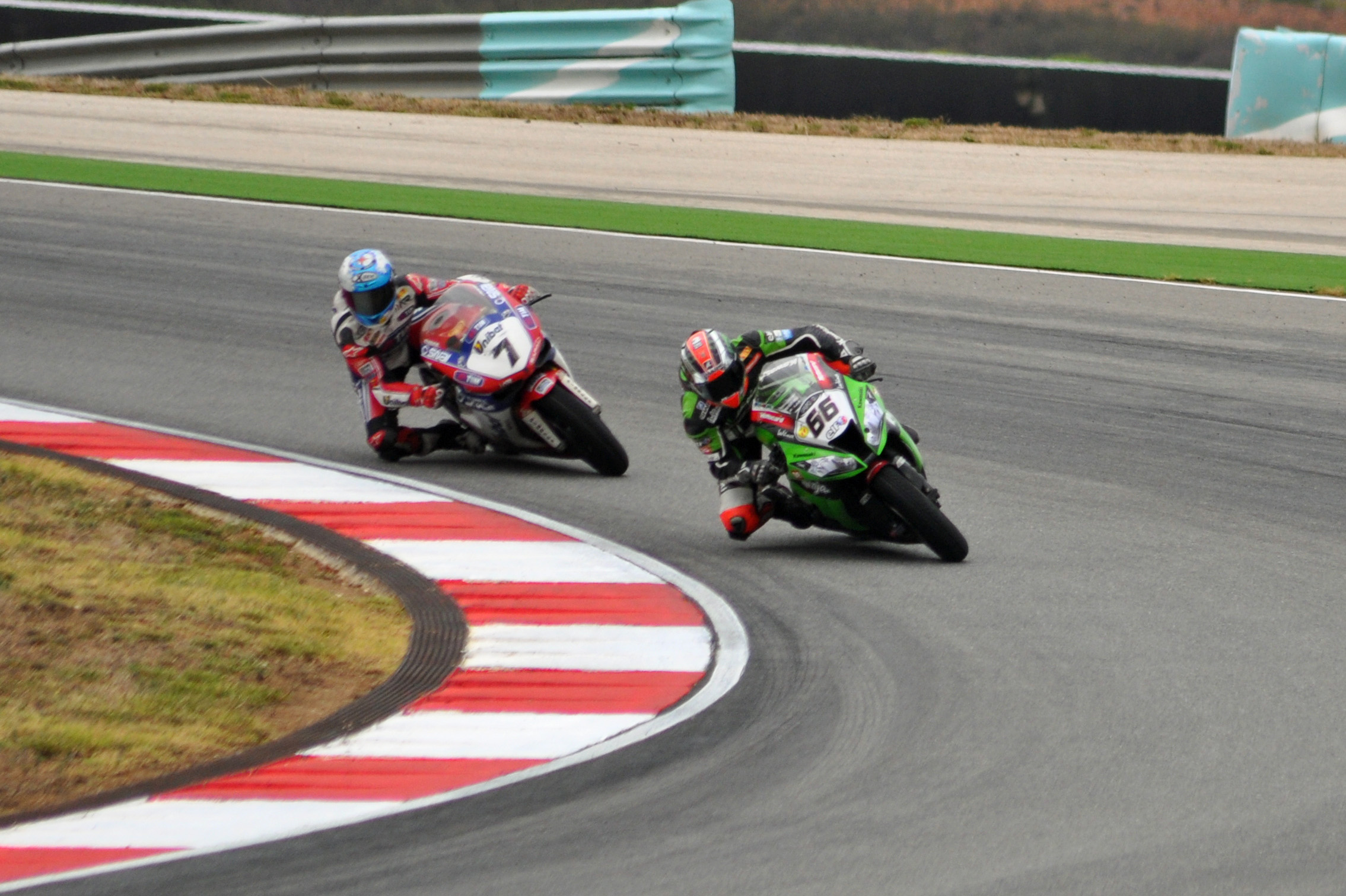 Autódromo Internacional do Algarve (2012-09-23), by Klugschnacker in Wikipedia (62) Carlos Checa (ESP) auf Ducati, Tom Sykes (GBR) auf Kawasaki